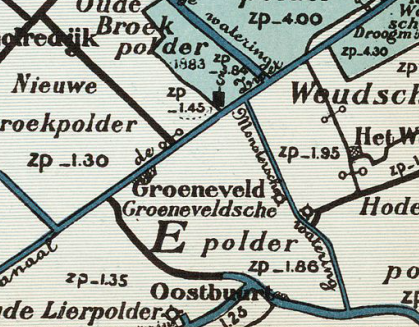 Groeneveldse_polder